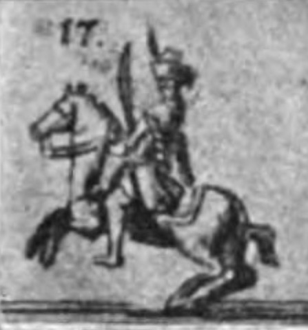 Darstellung des Janko Peranski († 1689) bei einer Parade im Jahr 1678. Ausschnitt aus einem Kupferstich von Gabriel Tzschimmer (1629-1694). In: Die Durchlauchtigste Zusammenkunft [...], Nürnberg 1680.